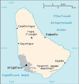 Barbados mapa ukr.PNG: Мапа Барбадосу.